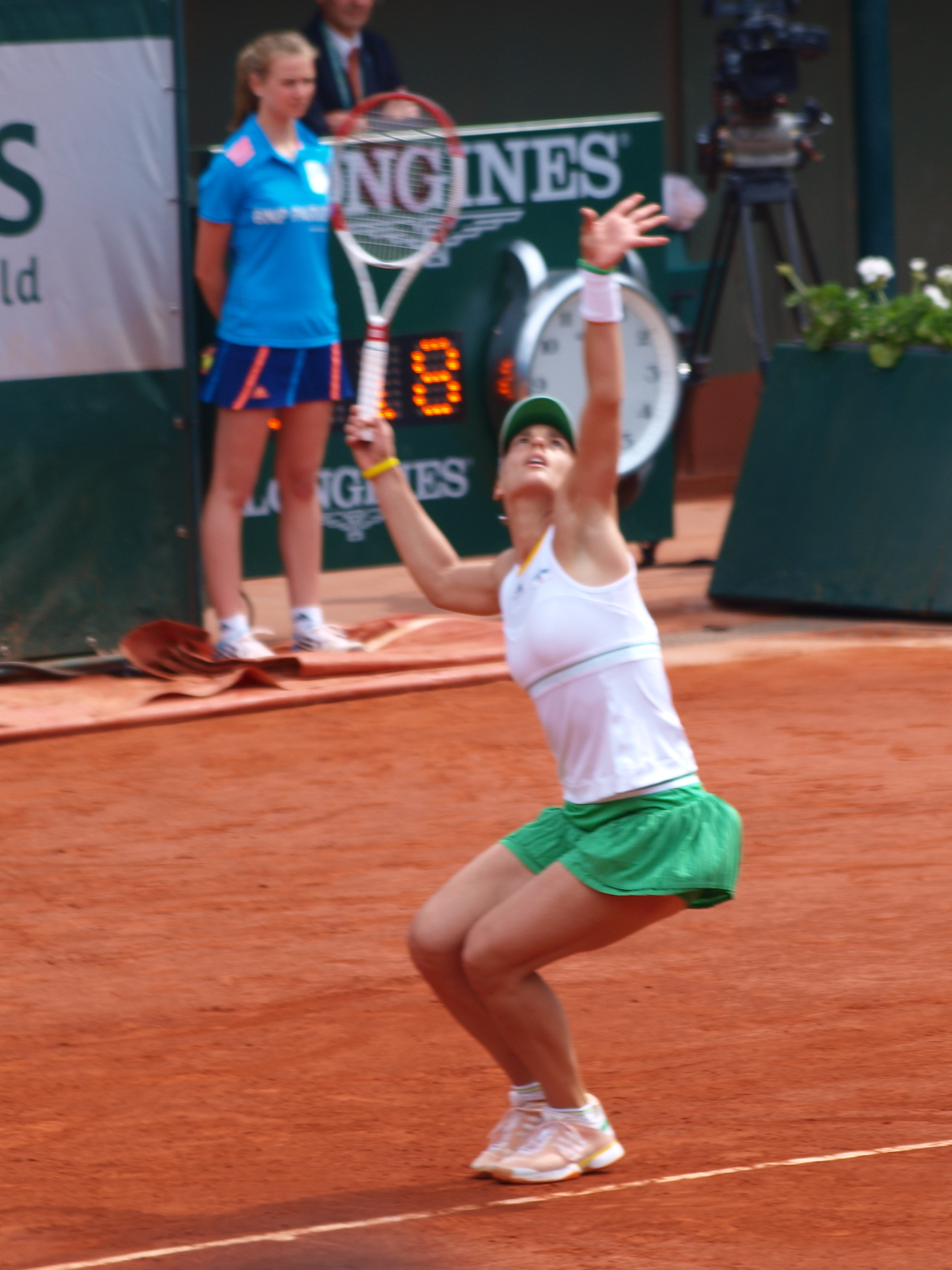 Internationaux de France de tennis, le 2 juin 2014, sur le court Philippe Chatrier : Andrea Petkovic.